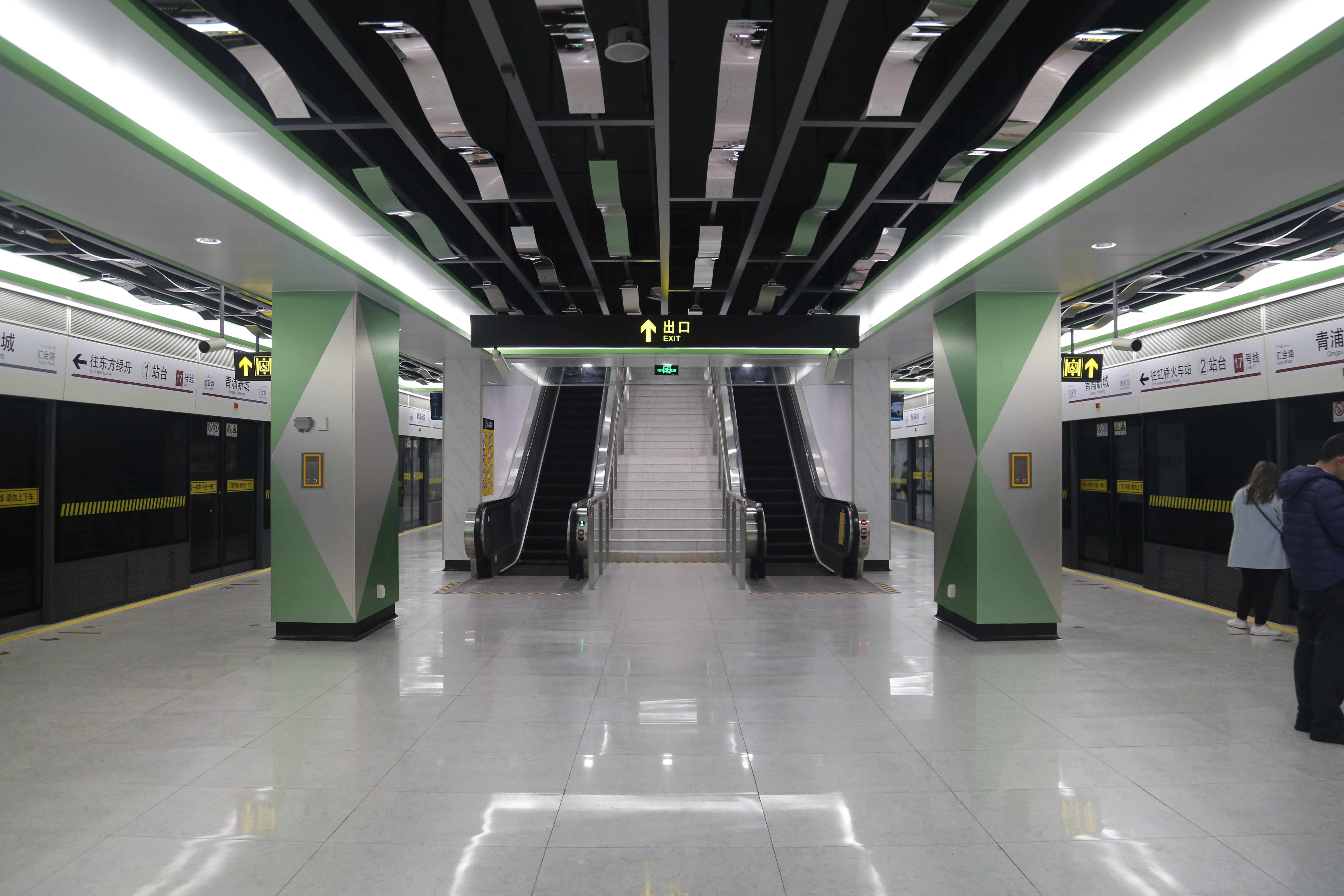 青浦新城站站台